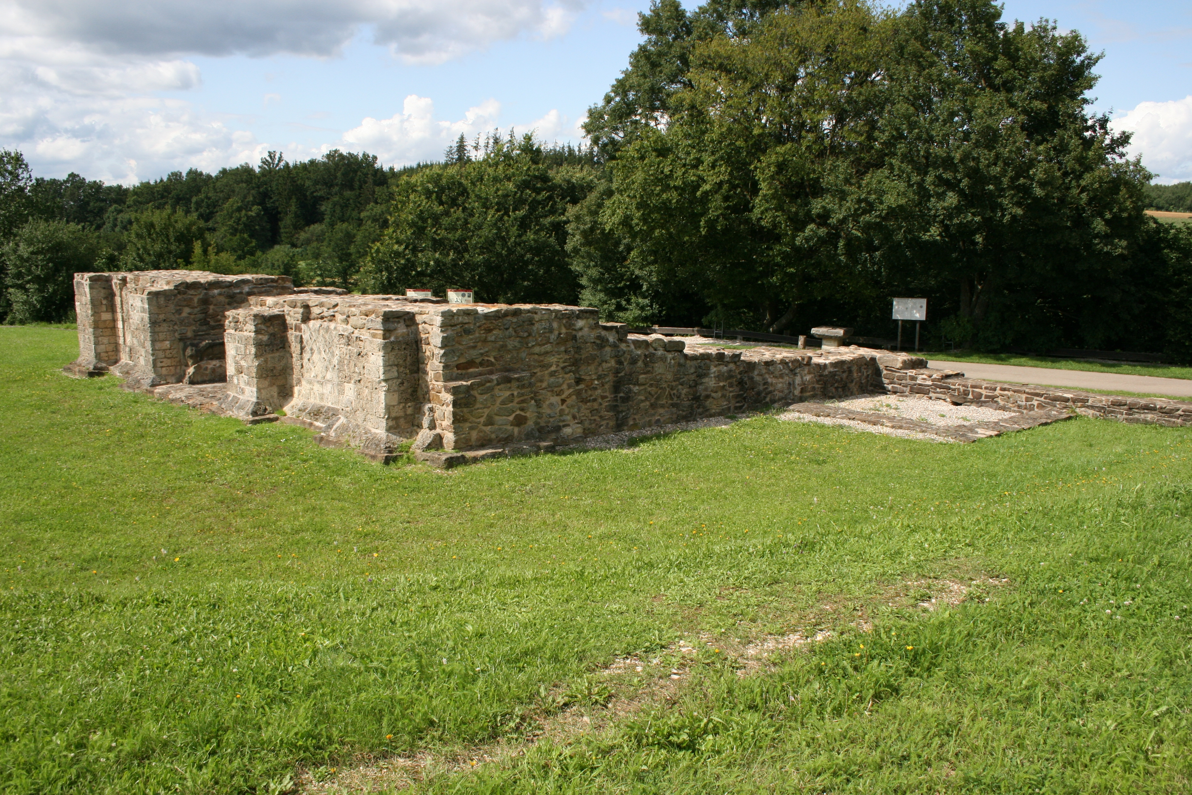 Ansicht des Limestors Dalkingen von Südwesten.